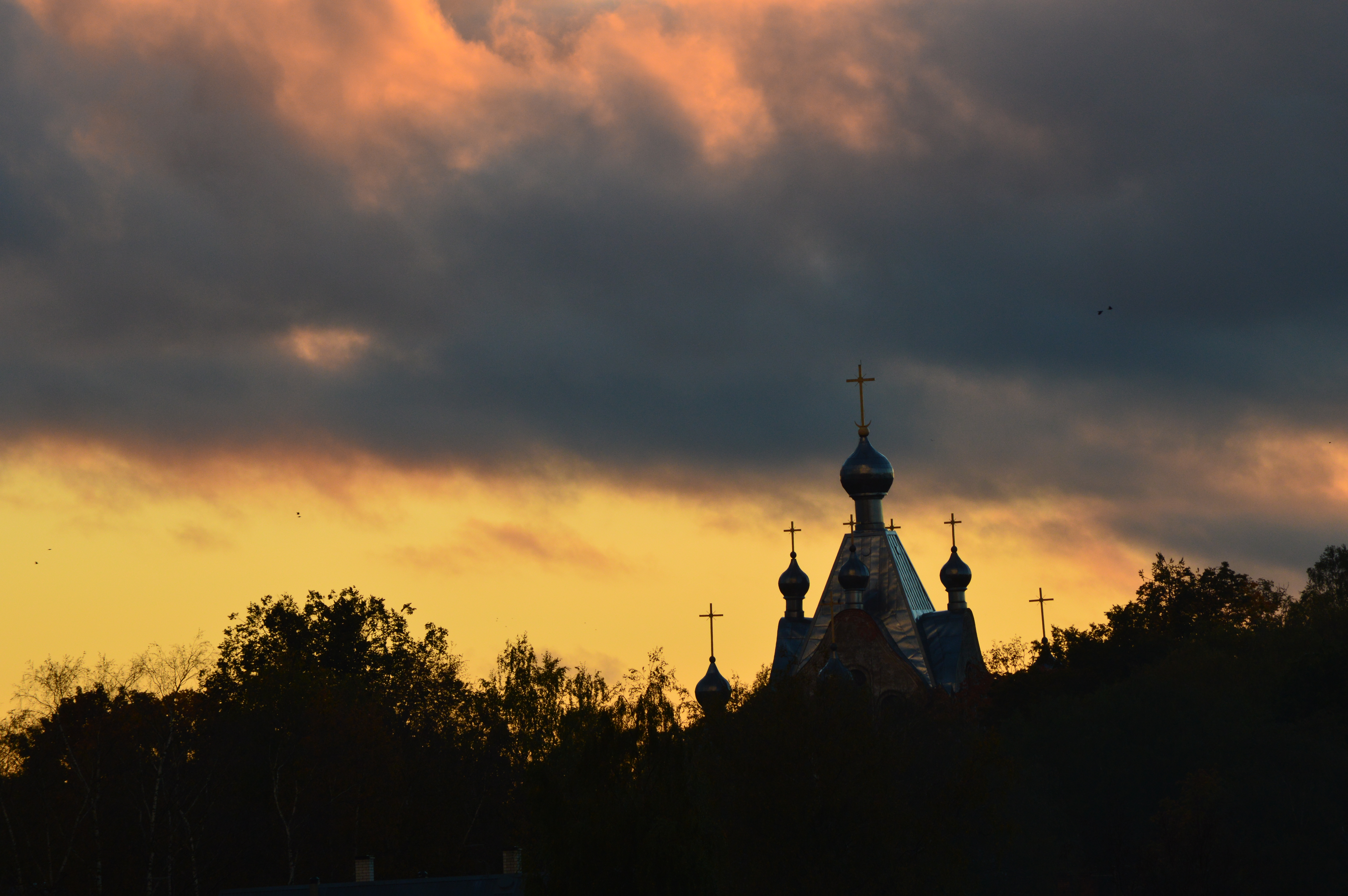 Tartu Aleksandri kirik, 1914-1915.a.